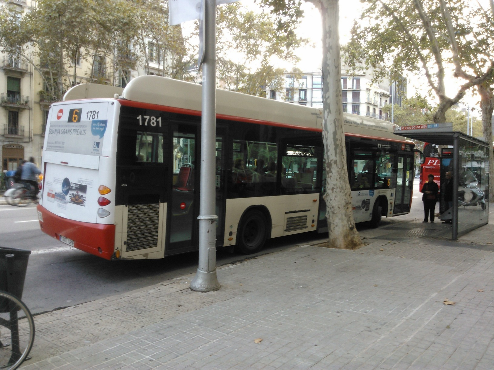 Autobús urbà de Barcelona